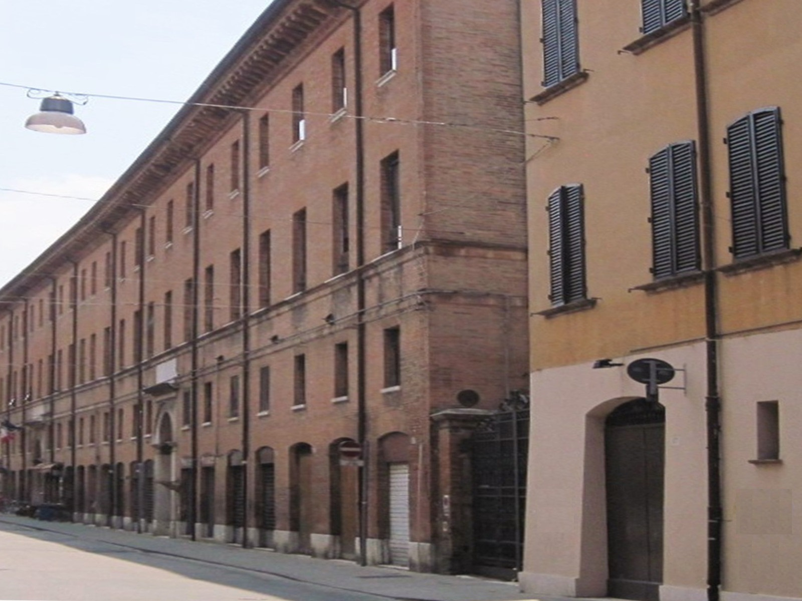 Via Ripagrande, Ferrara. Vicolo tra edificio dell'ex Casa di Riposo e casa dei Conti Beccaria, detto Cul di Venere o Calle di Venere